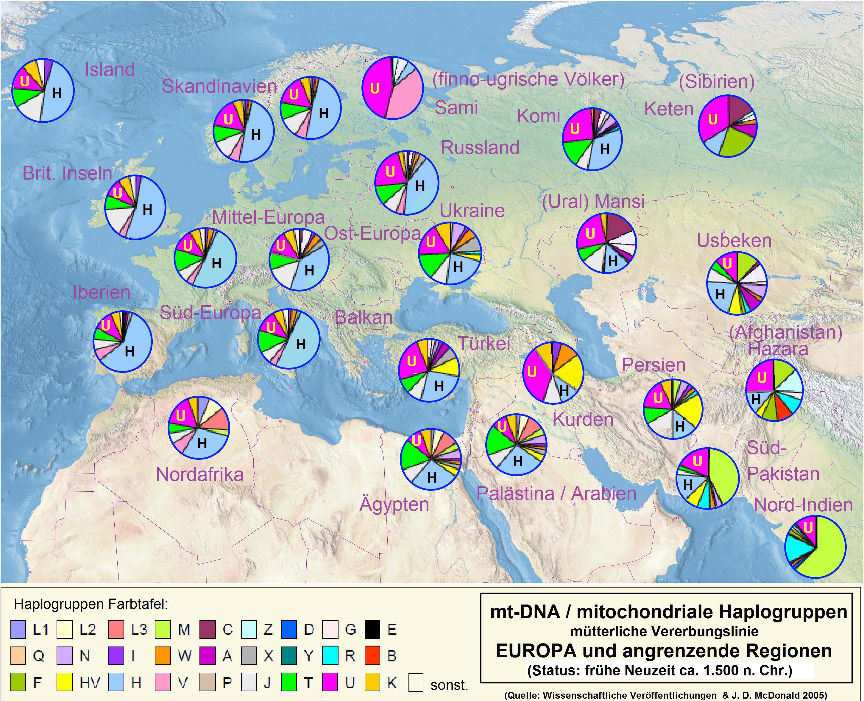 Mitochondriale Haplogruppenverteilung Europas in der Neuzeit. Besonders dominant die Haplogruppen H und U.